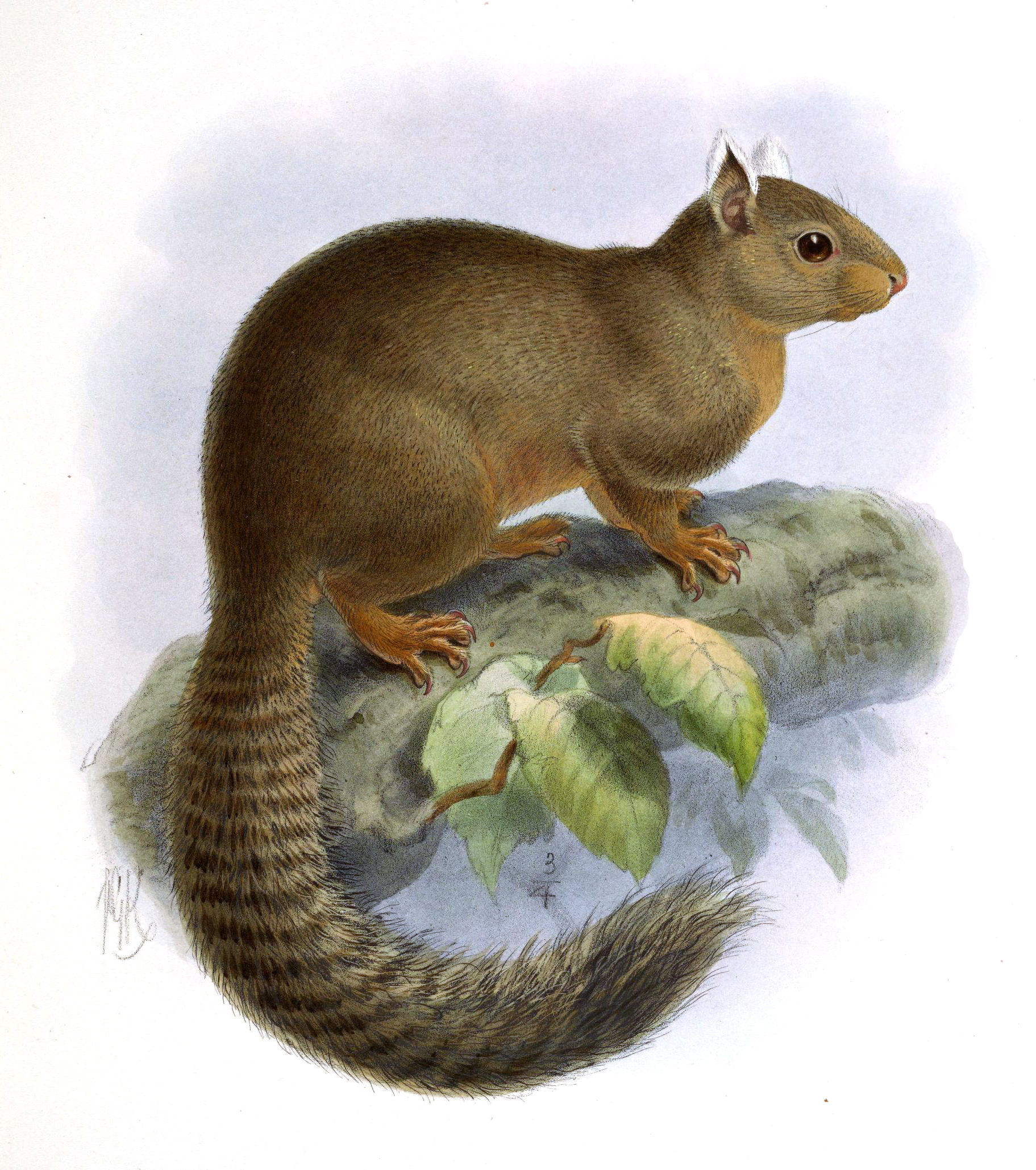 Sciurus alstoni = Prosciurillus alstoni